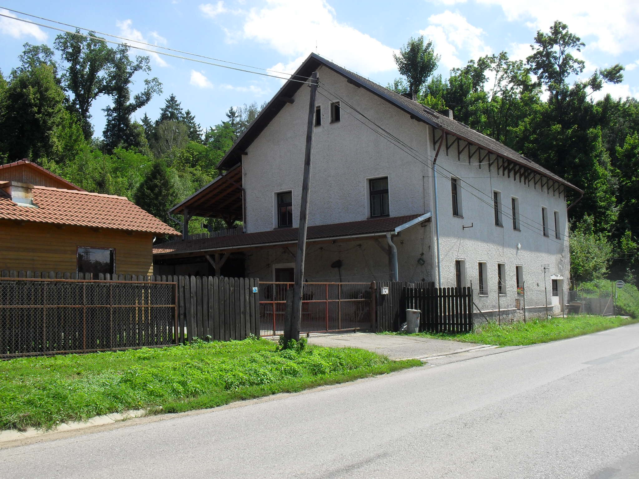 Jediné stavení v benešovské části Baba